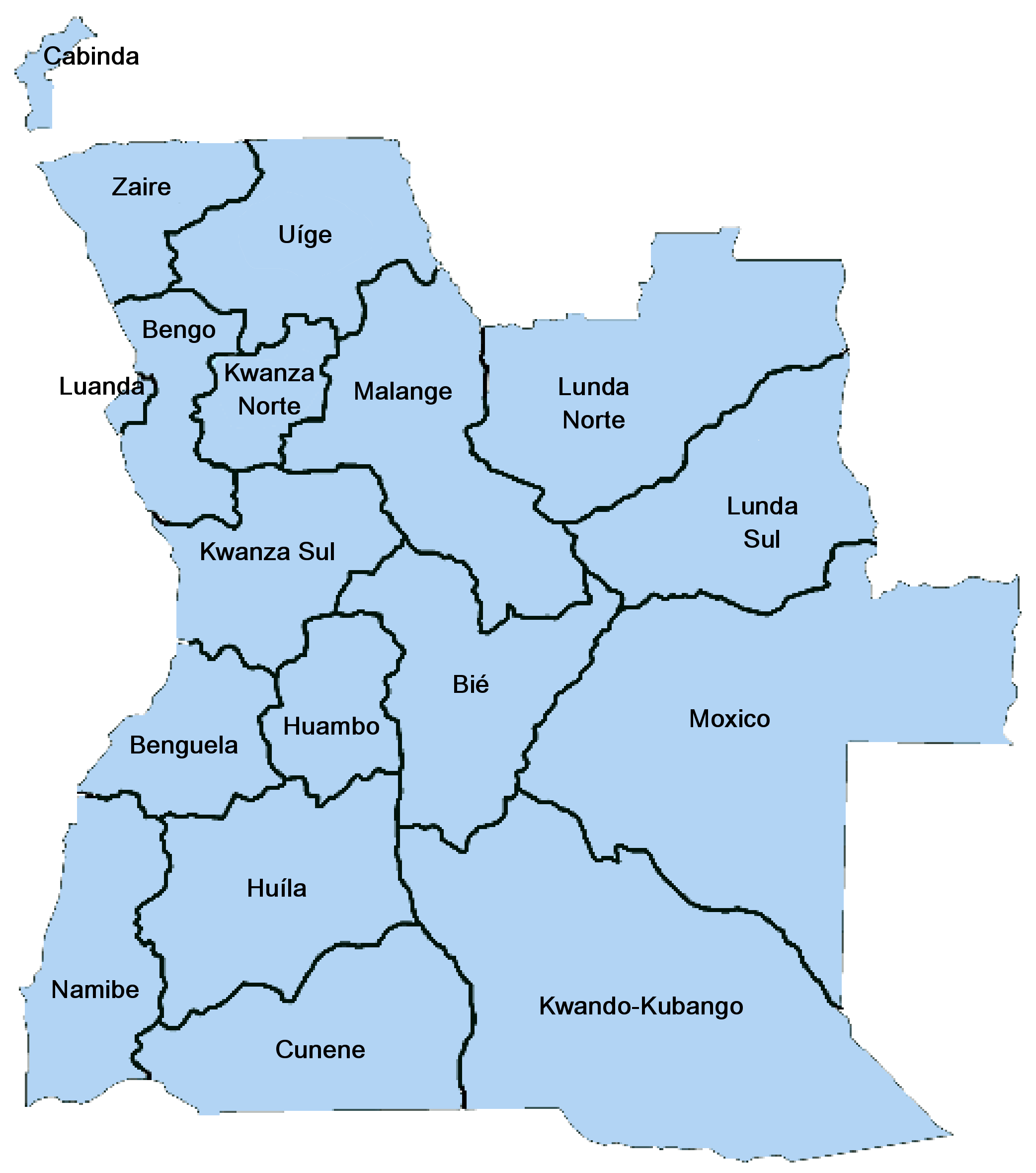 Mapa das Províncias de Angola